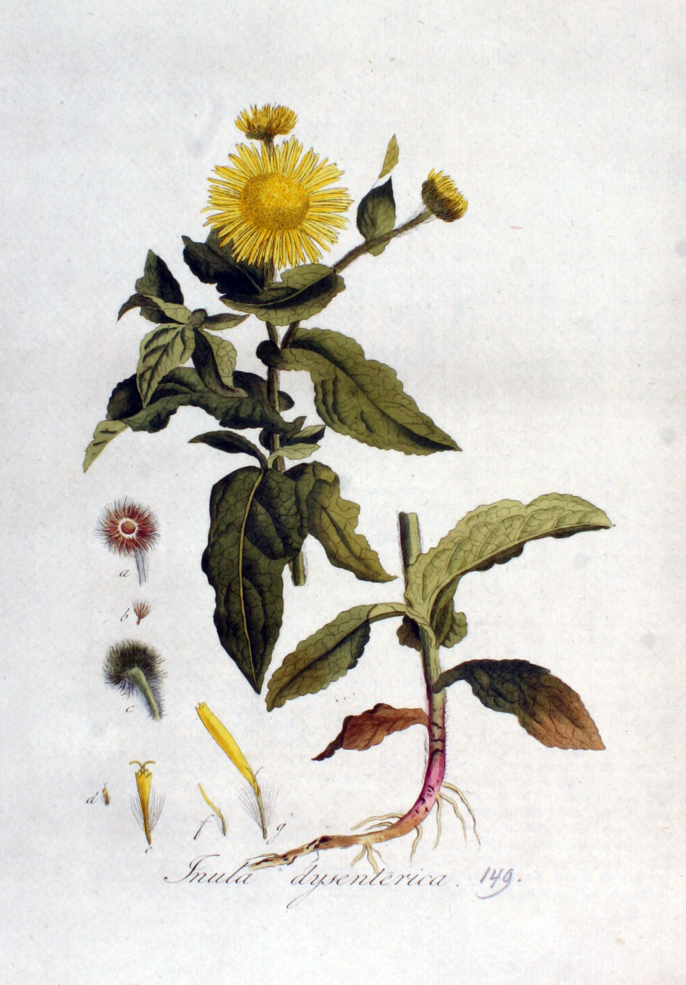 Pulicaria dysenterica (L.) Bernh. (Syn. Inula dysenterica L.